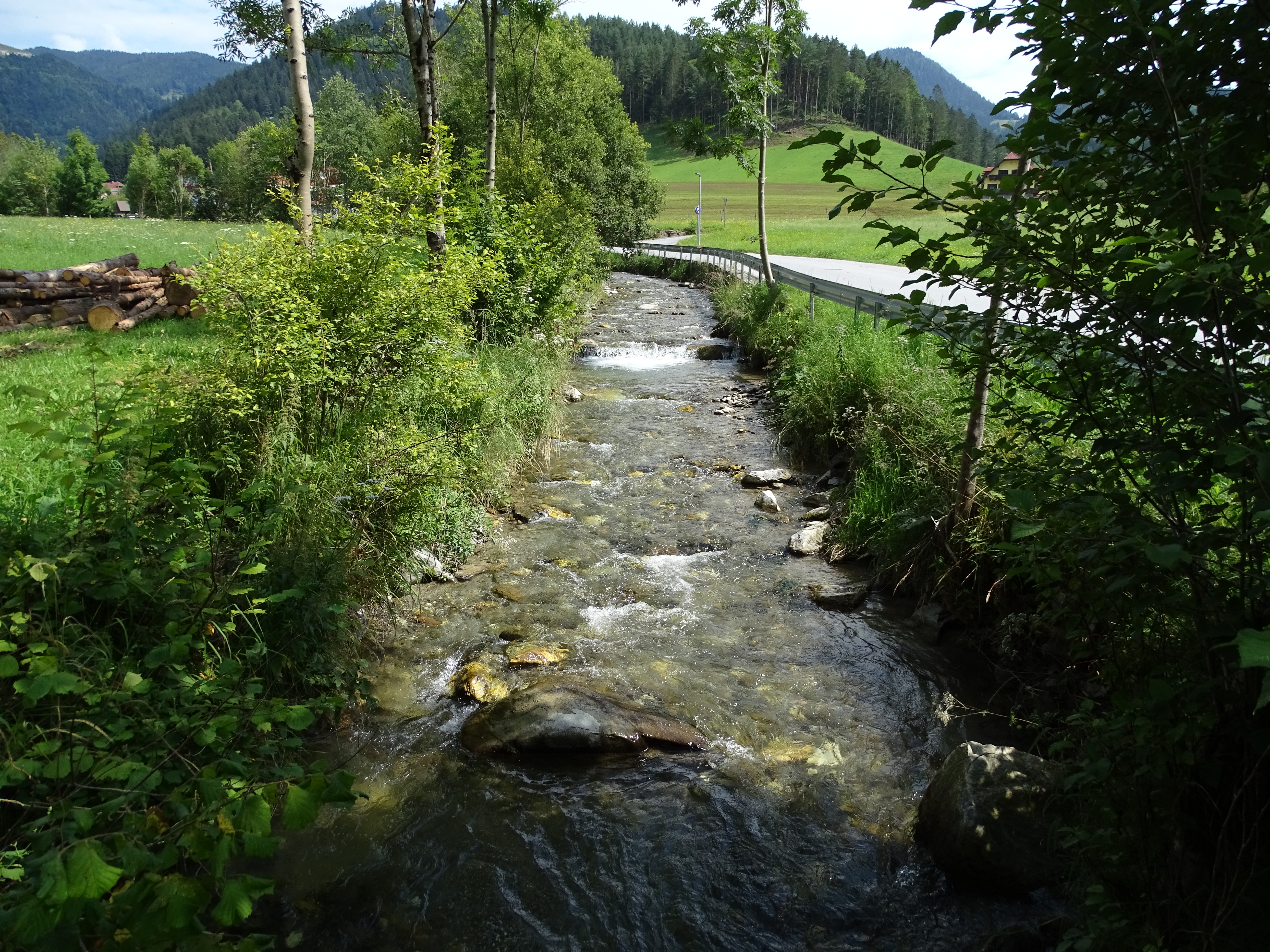 Die Kainach bei der Hauptstrasse in Gallmannsegg, unweit der Walcher-Kapelle